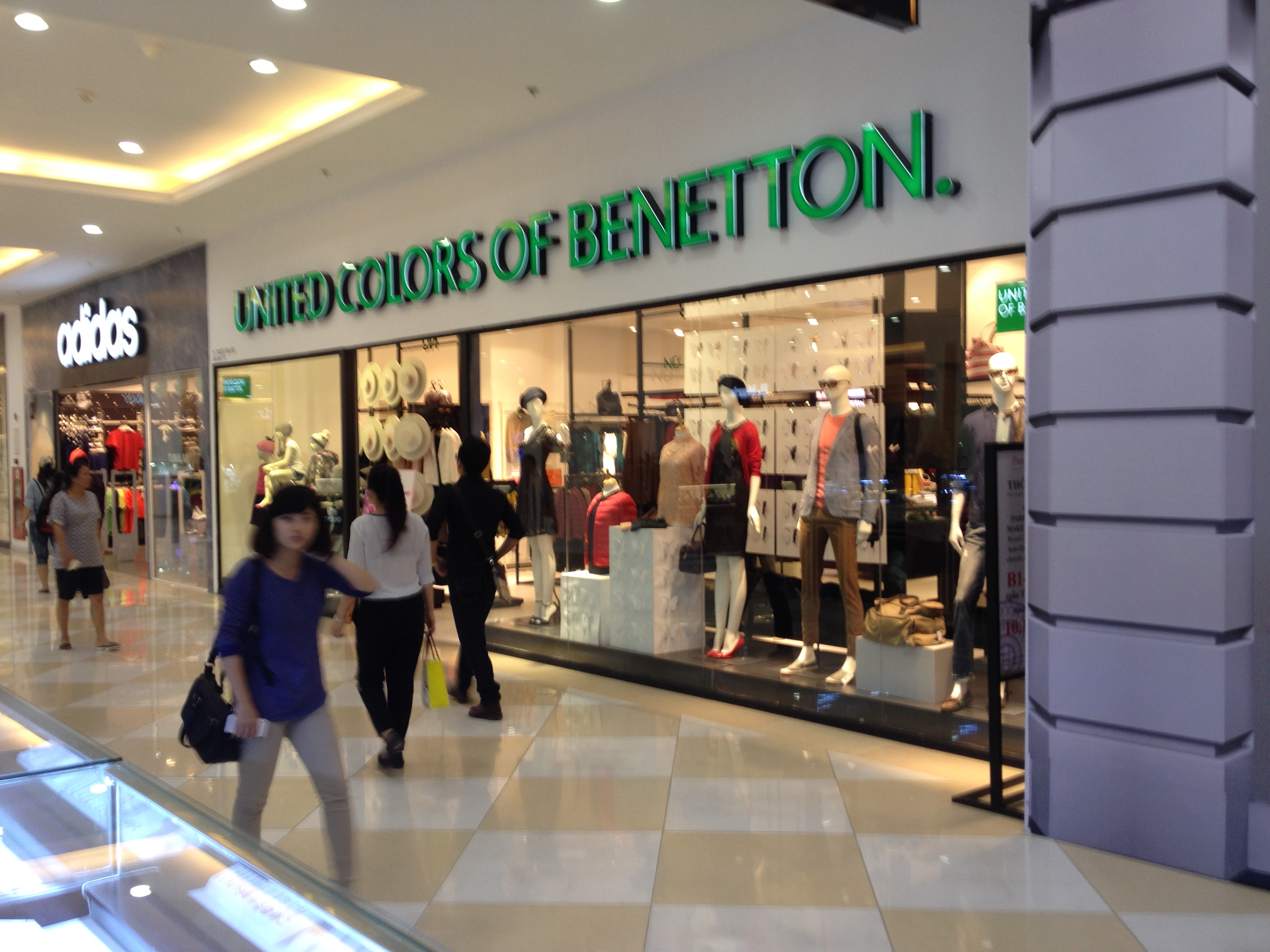 Royal City, Hà Nội, Việt Nam.